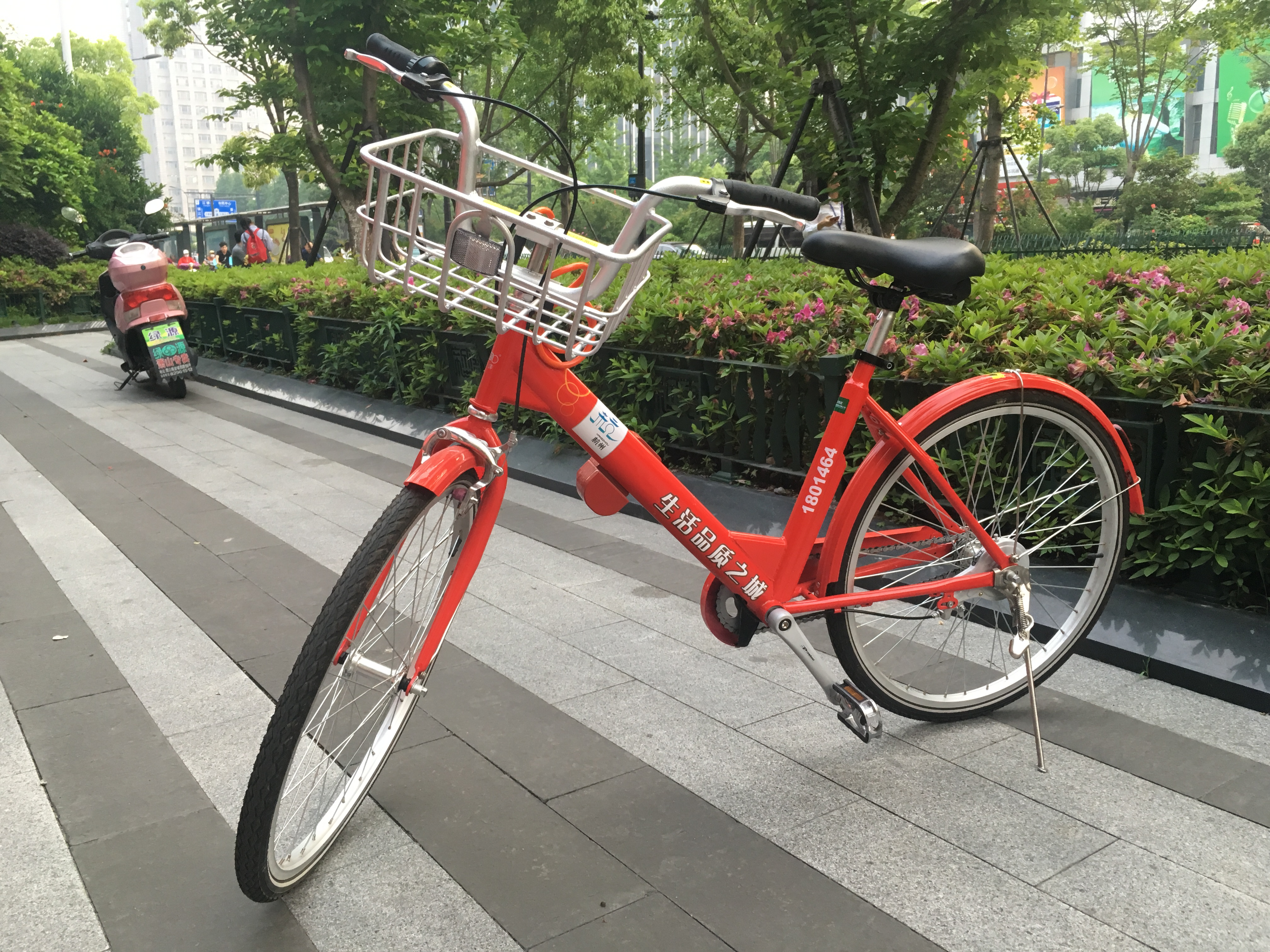 一部2018版杭州公共自行车